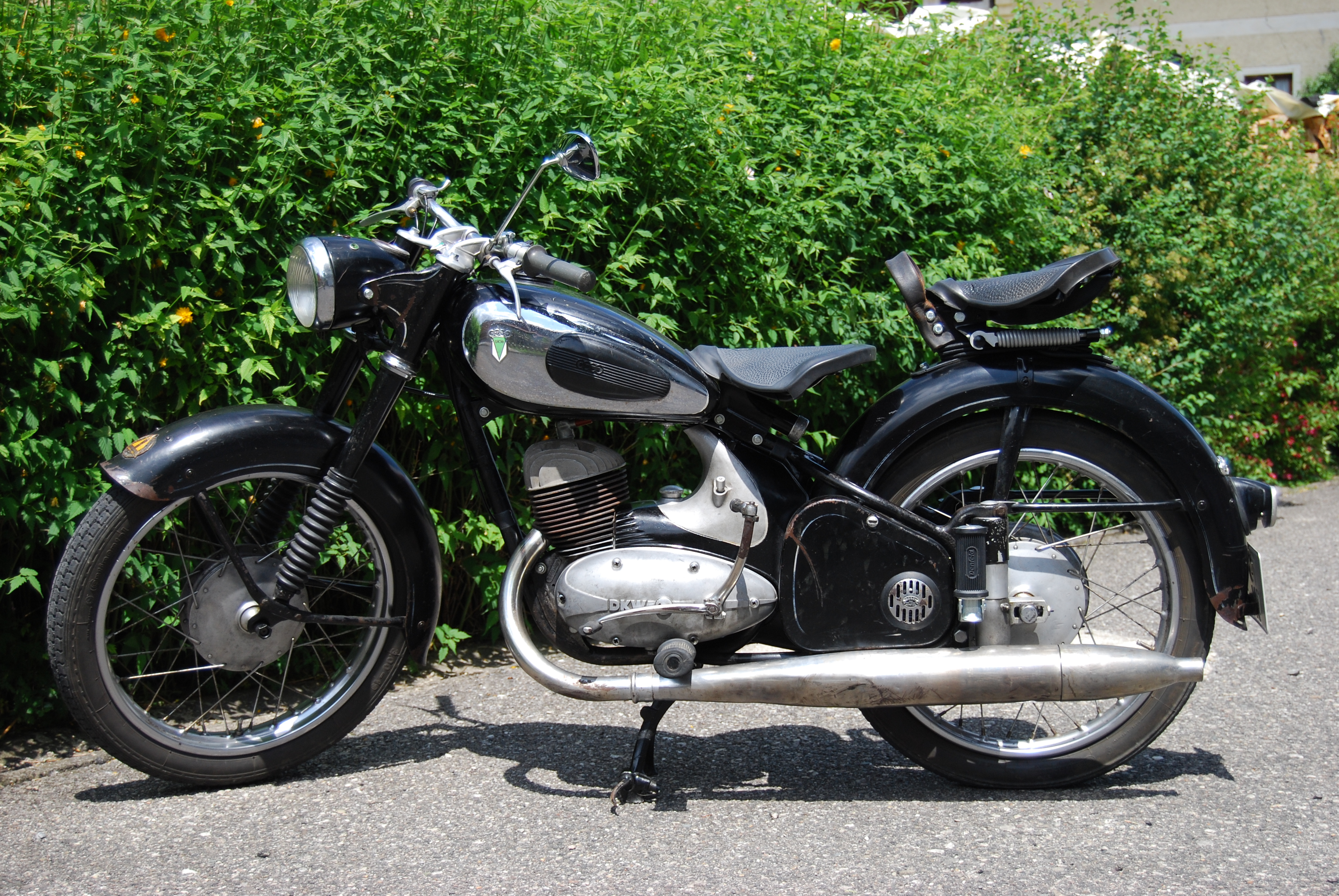 DKW Motorrad RT 175, Baujahr 1954